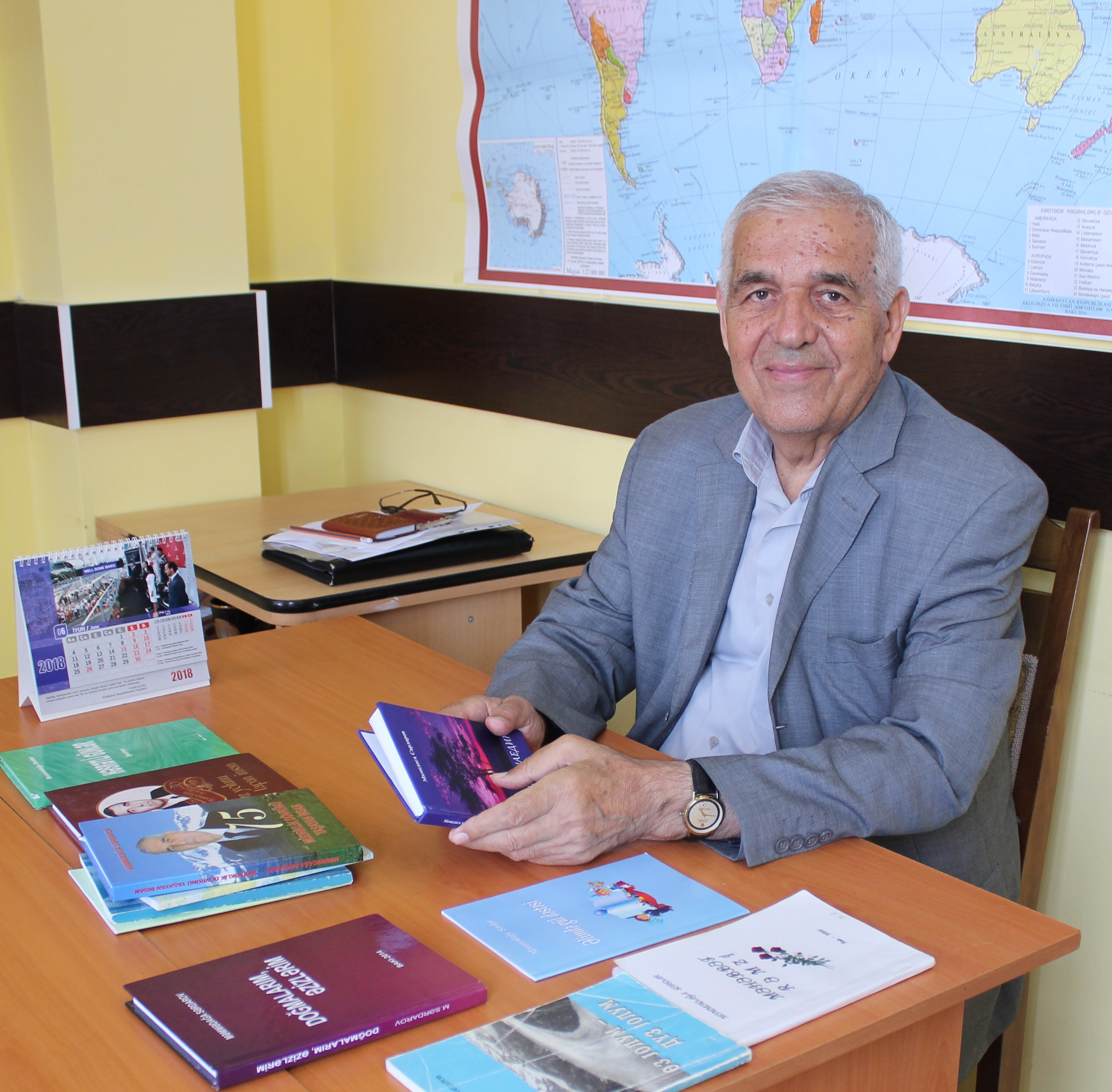 Məmmədağa Sərdarov iş başında